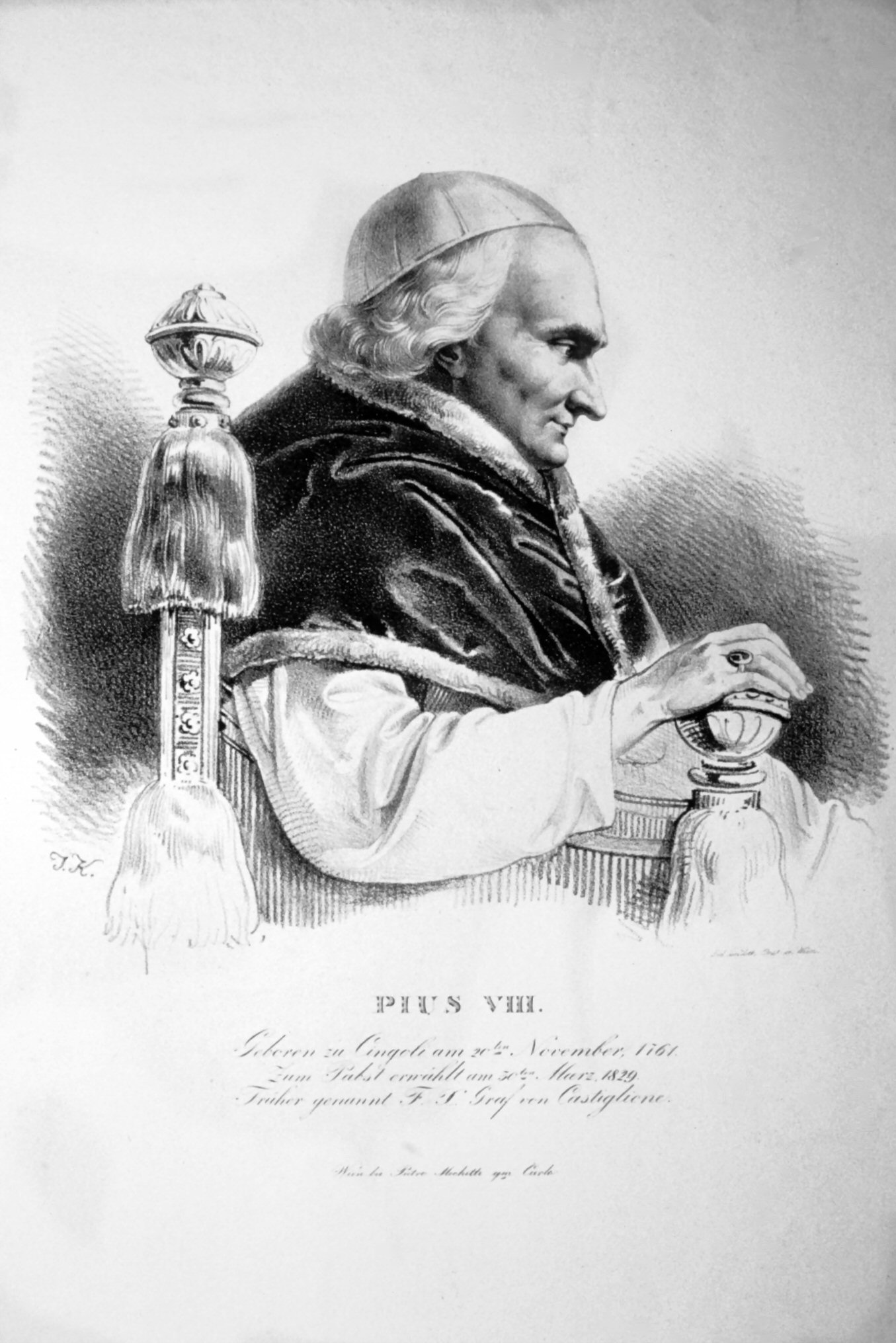 'Pius VIII. (1761-1830), Papst Lithographie von Josef Kriehuber, 1829